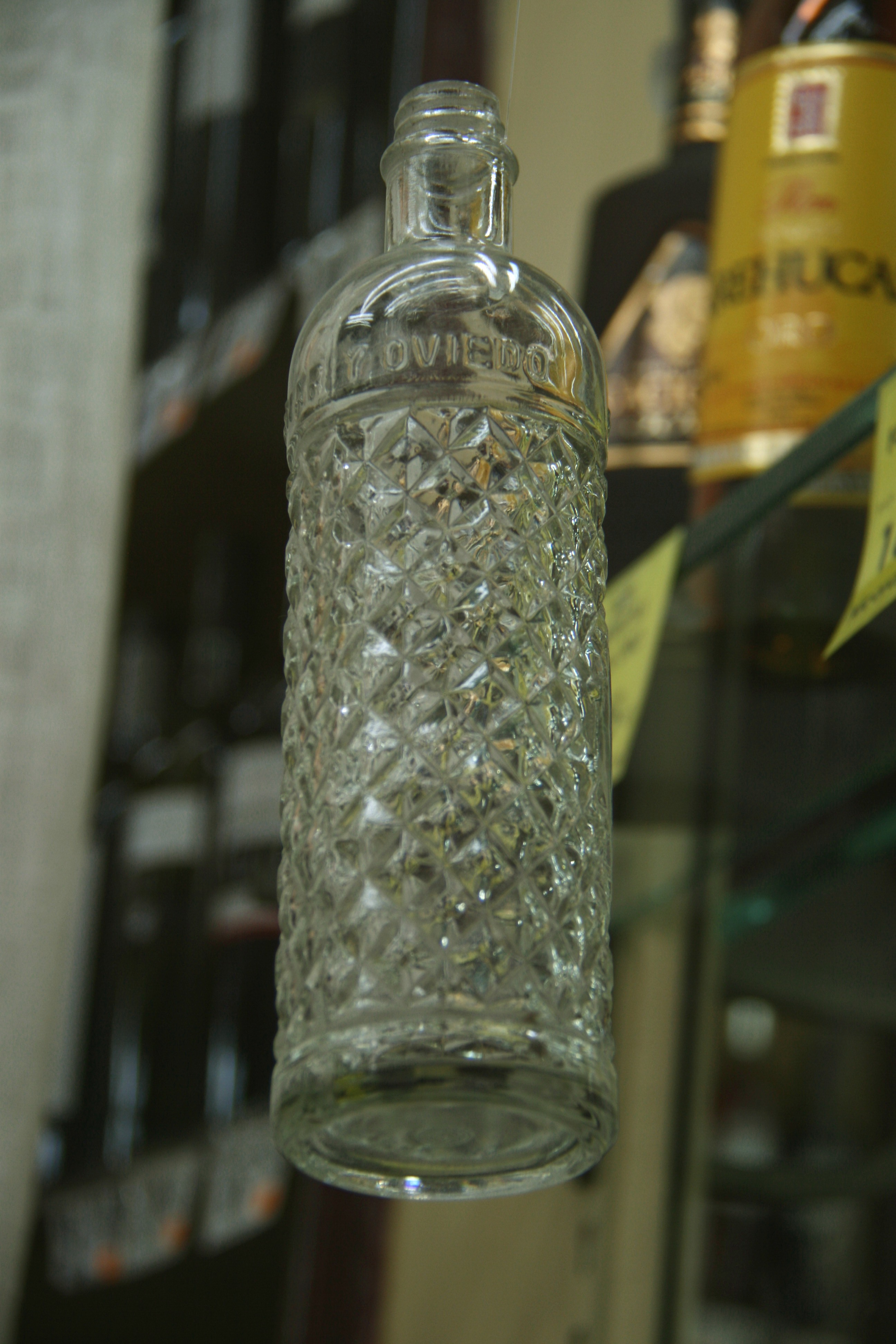 Botella de Anís de La Asturiana, con decoración típica.